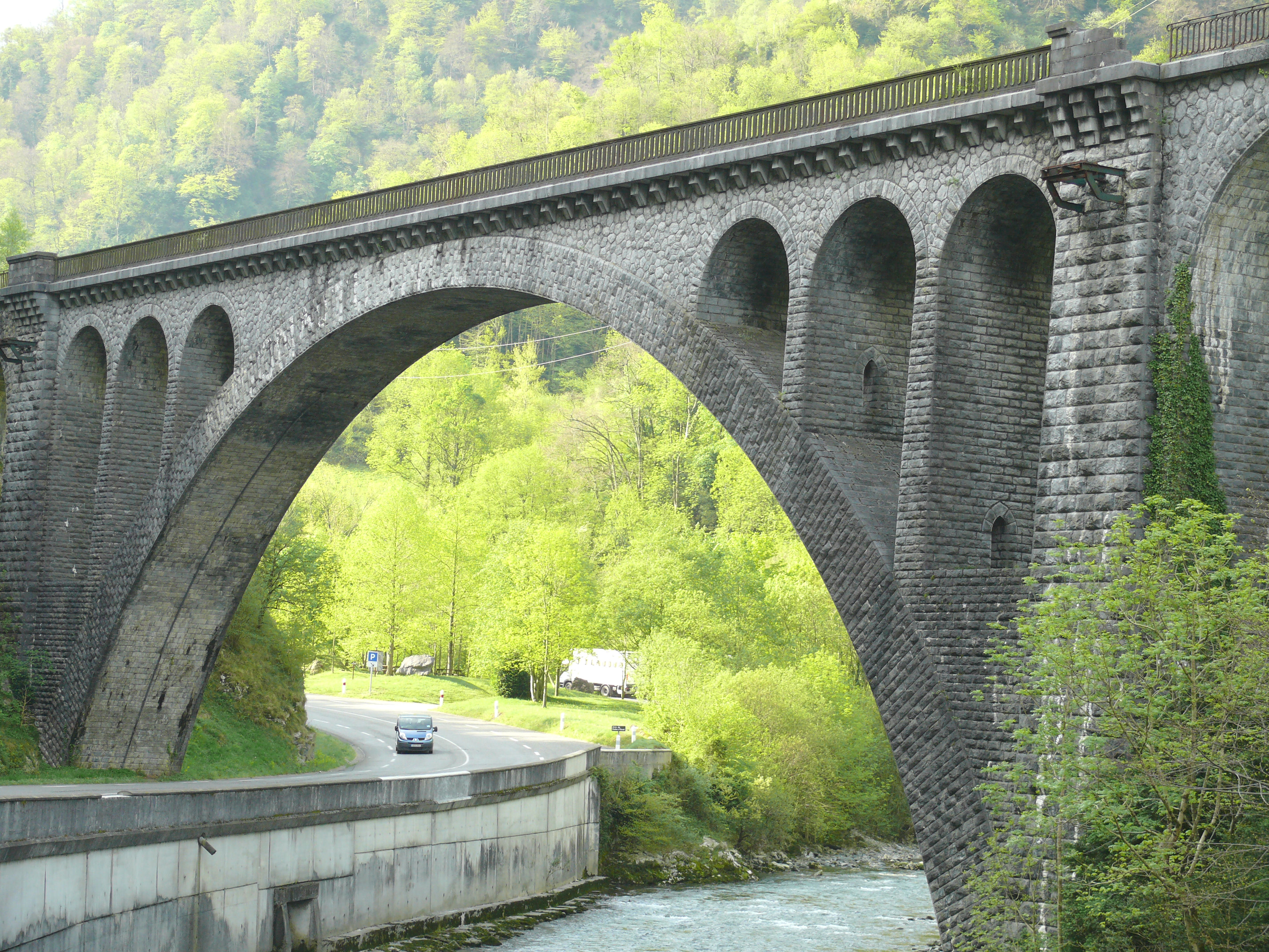 Ligne de chemin de fer Pau-Canfranc - Viaduc d'Escot